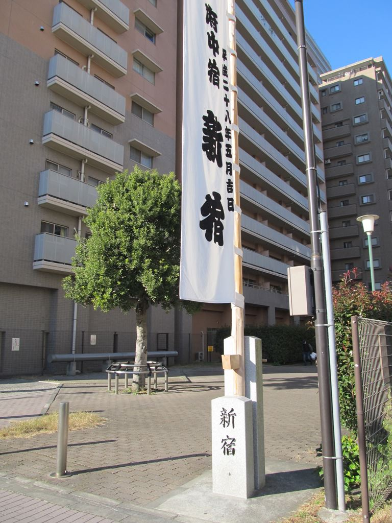 甲州街道府中宿新宿（しんしゅく）